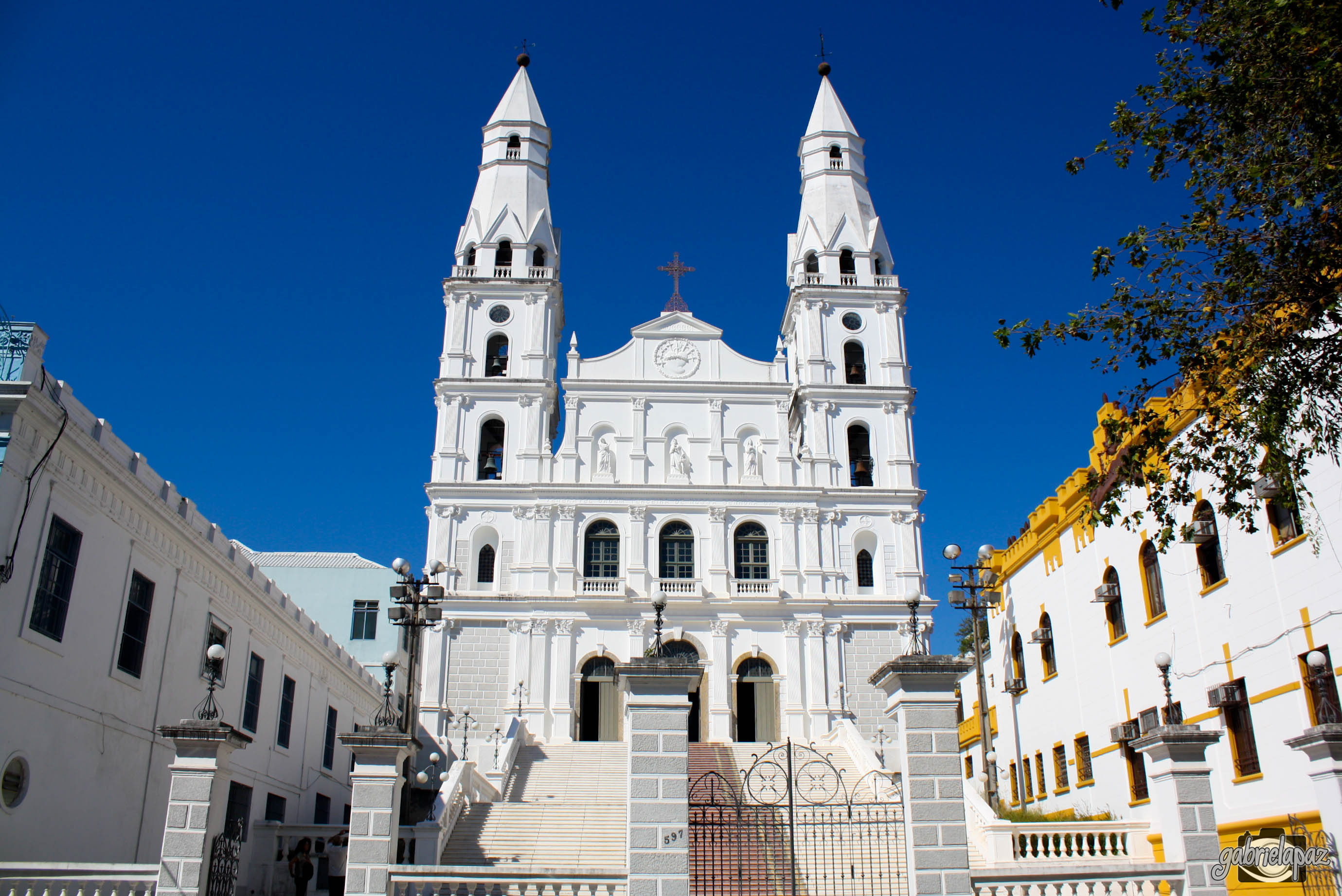 Igreja de Nossa Senhora das Dores